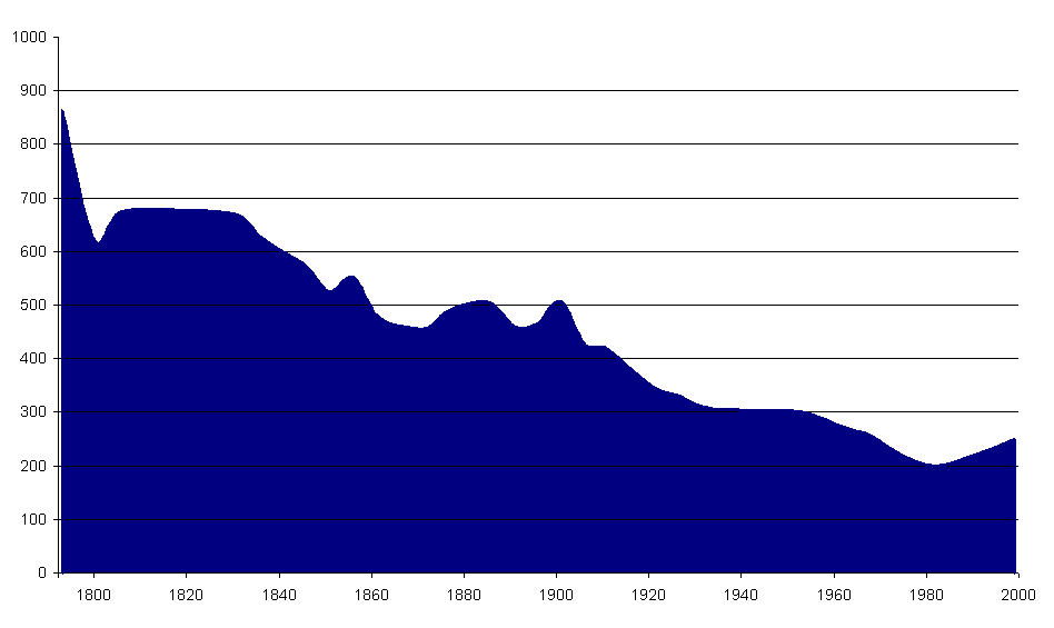 Evolution de la population d'Esclanèdes de 1793 à 1999